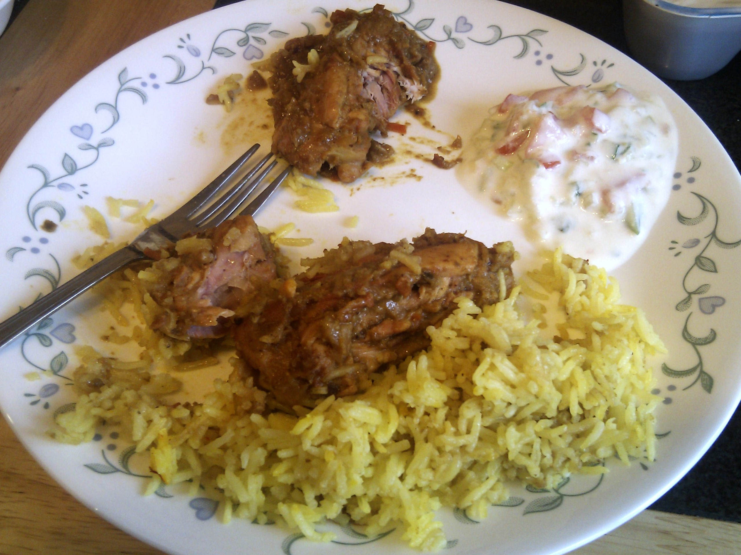 Chicken Biryani